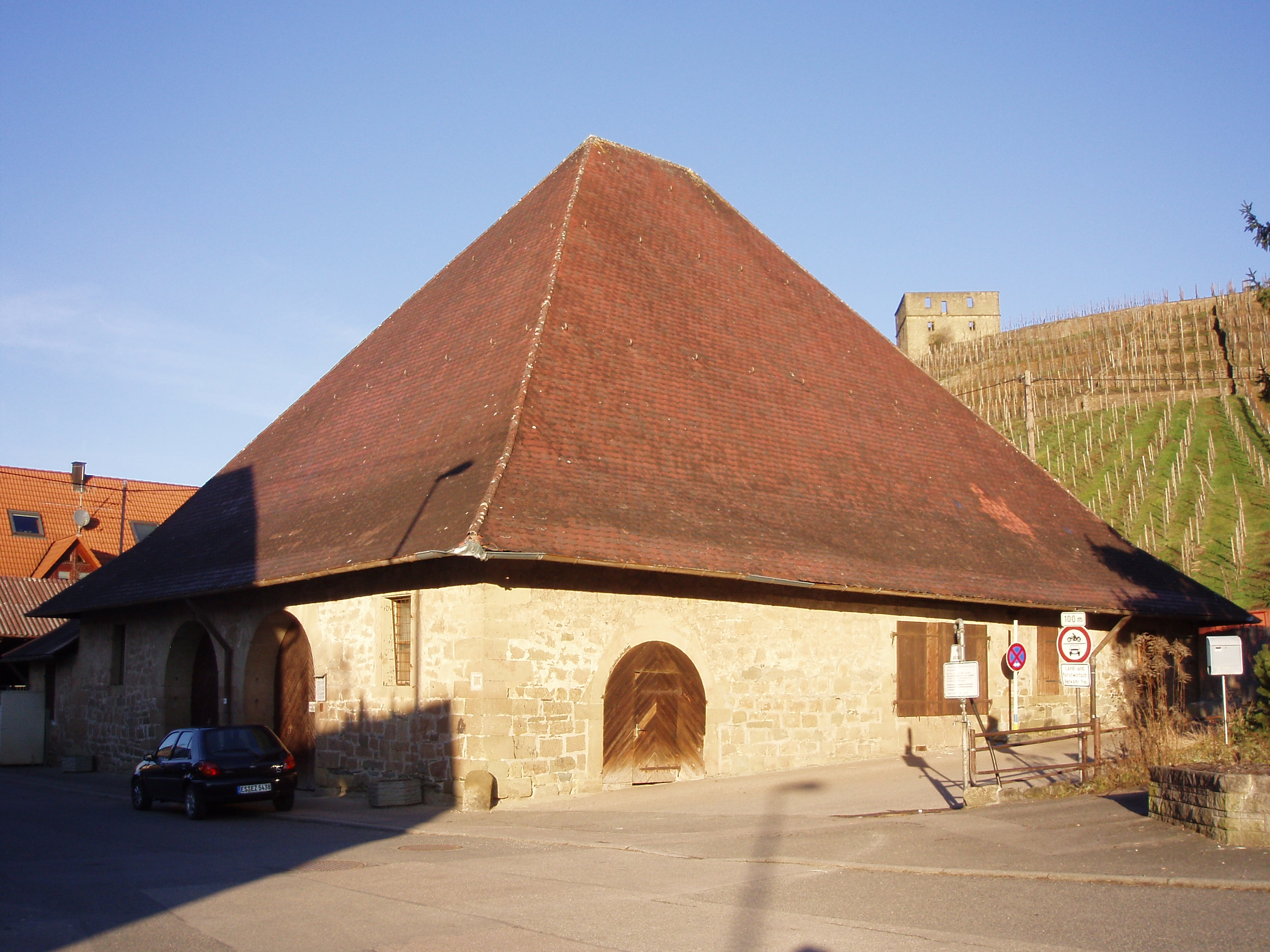 Glockenkelter